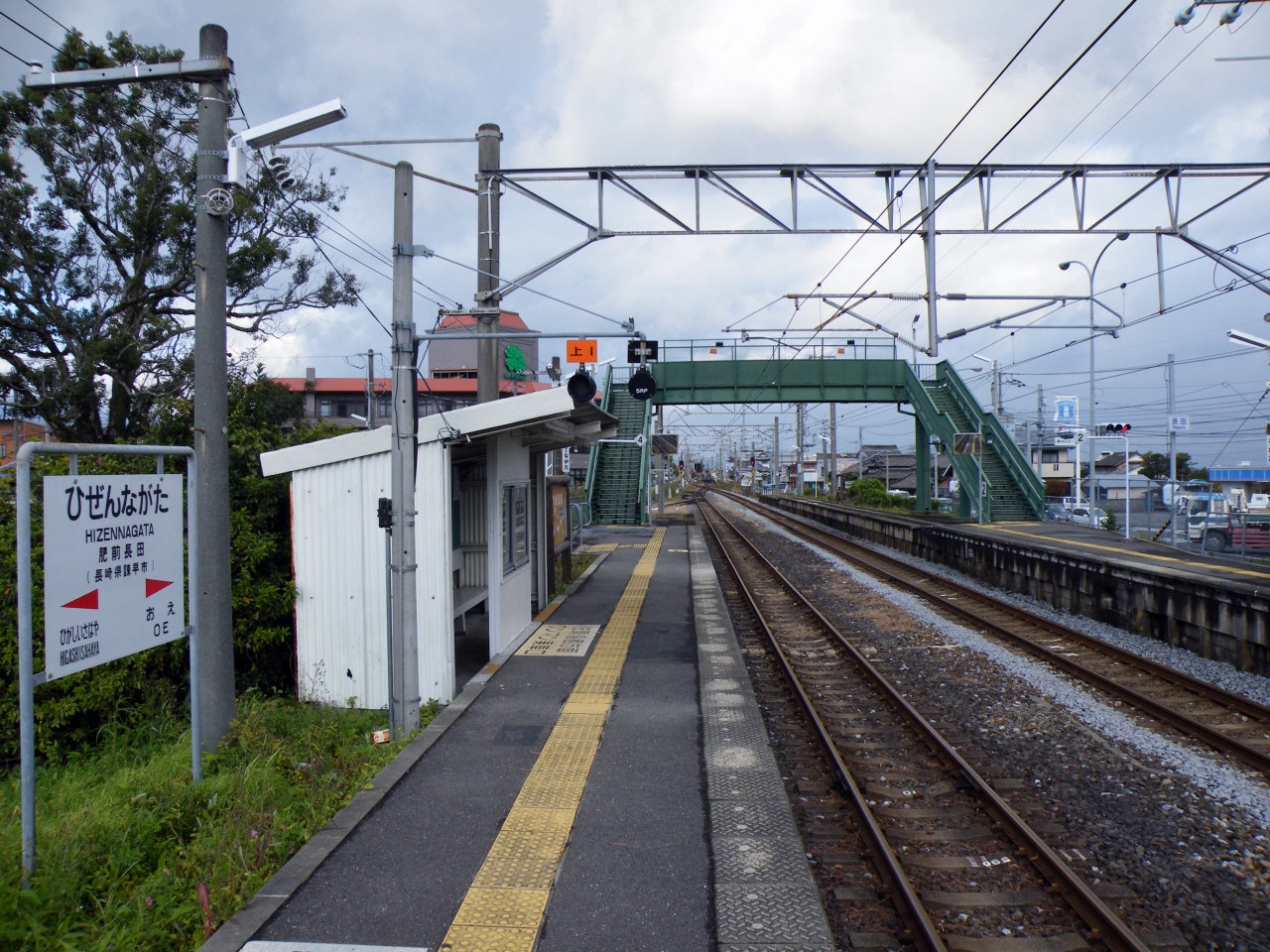 JR長崎本線肥前長田駅構内